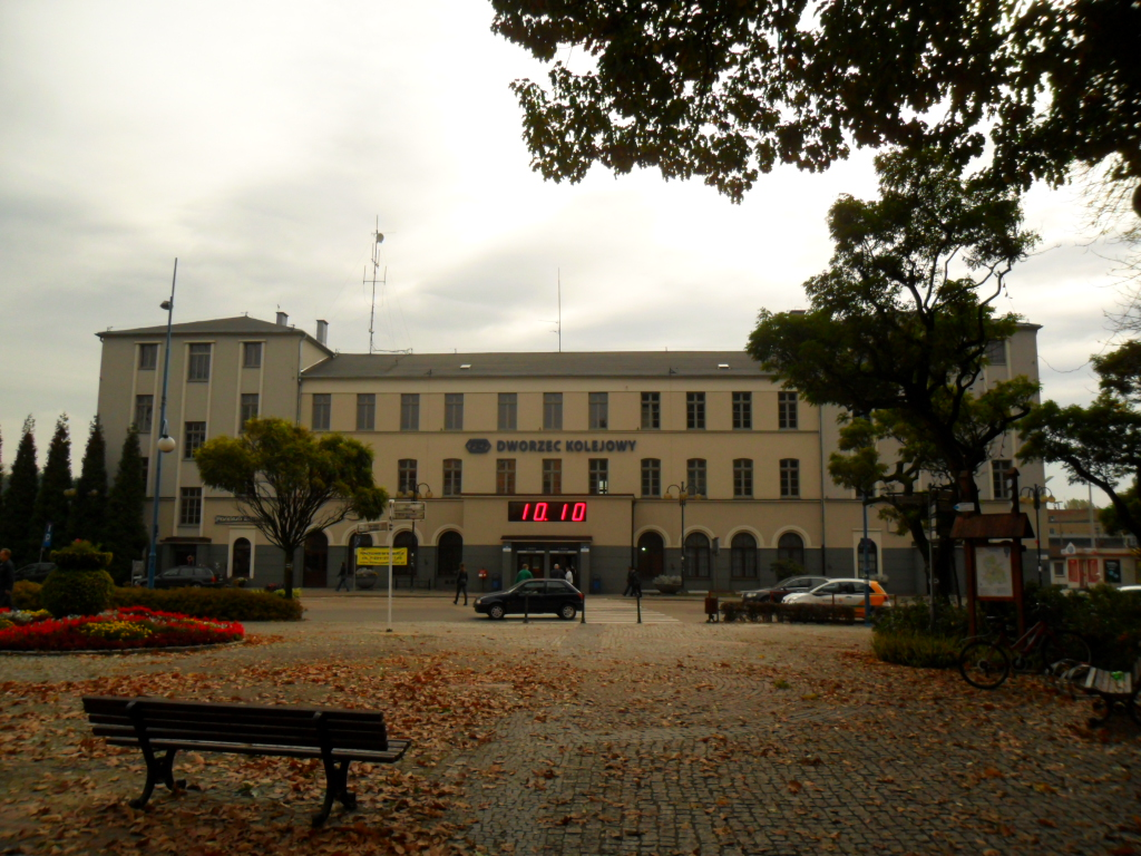 Stacja kolejowa w Rybniku